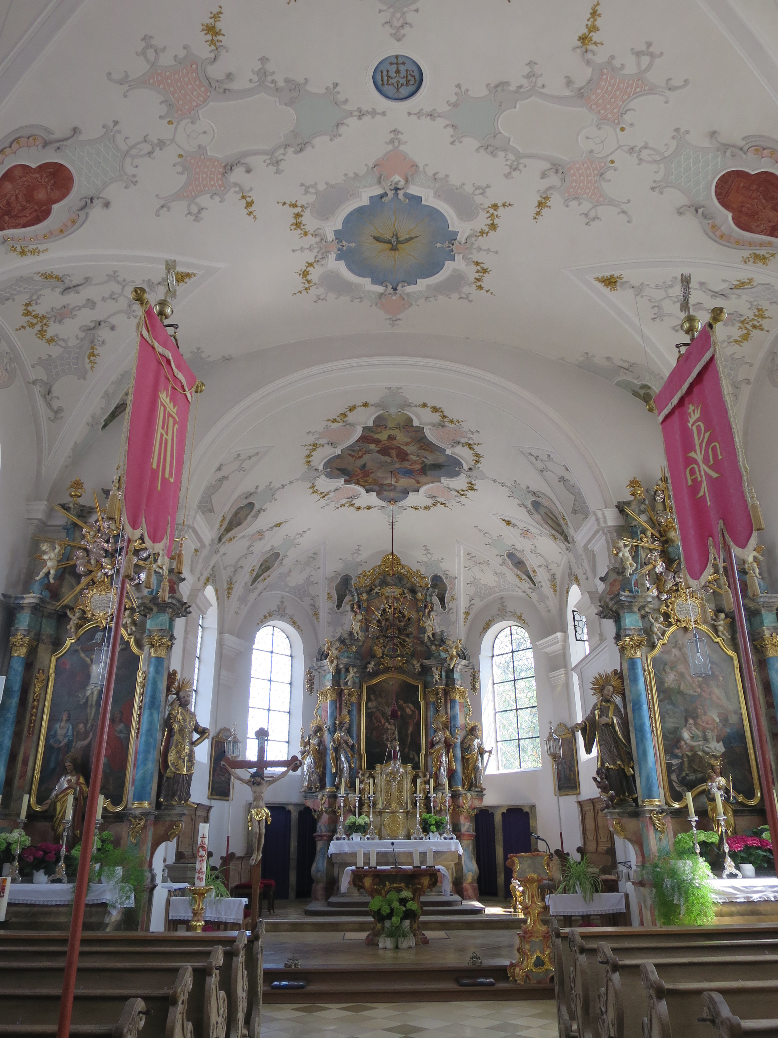 Innenraum der Kirche St. Johannes Baptist in Stadl.